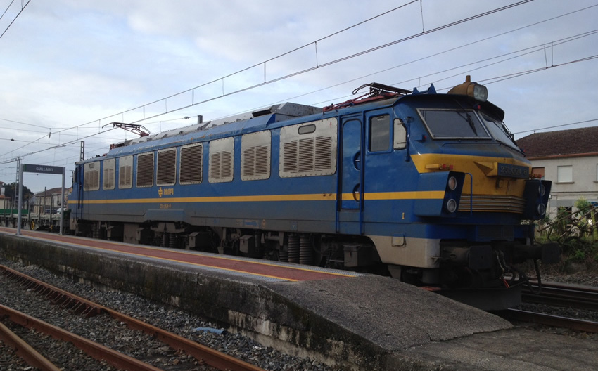 Locomotora eléctrica "Mazinger" S-251.004 de Renfe Operadora. La única locomotora que queda con la decoración original. La foto ha sido tomada por Diego Mata en la estación de Guillarei (Pontevedra).